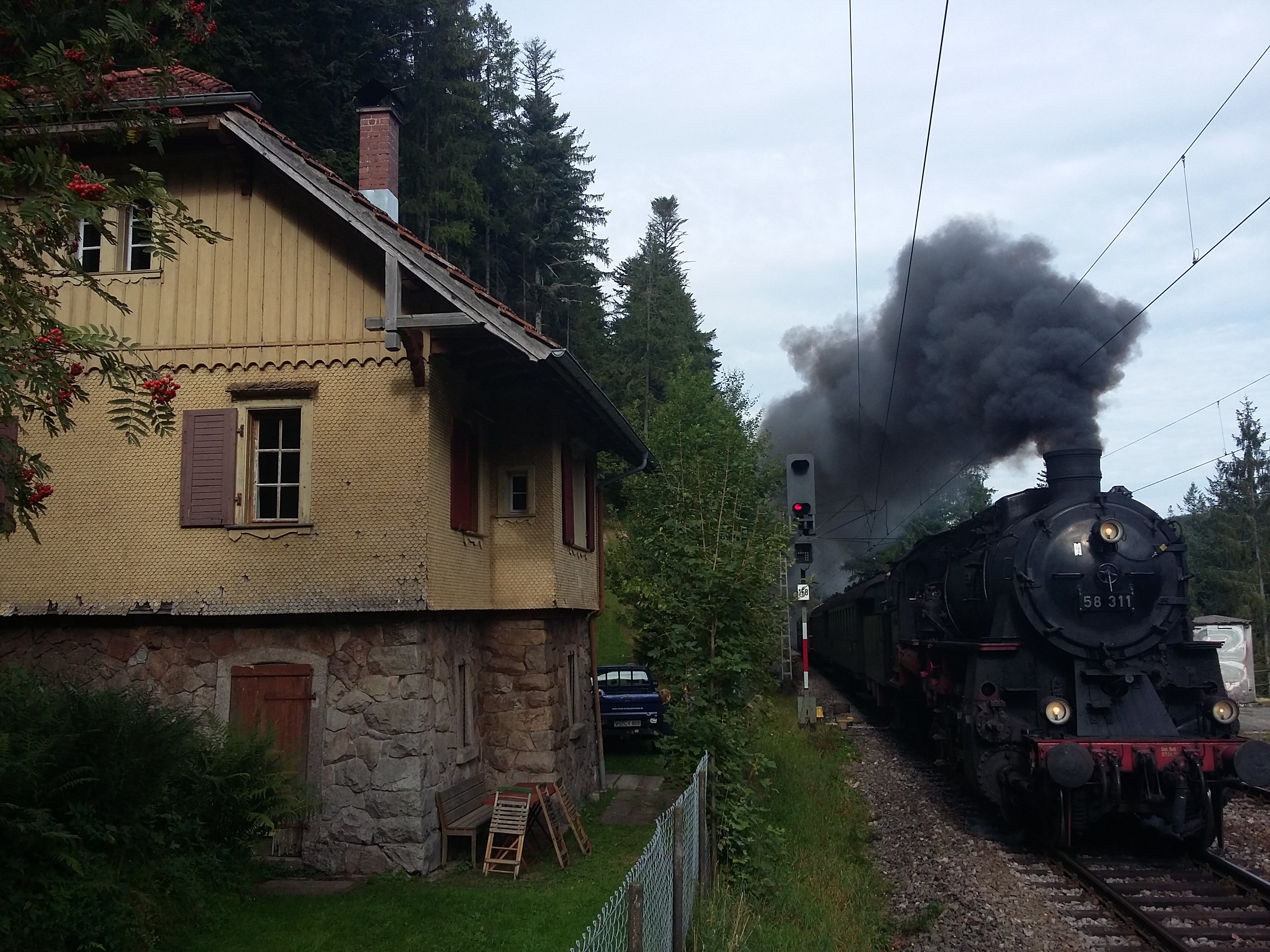 Wärterhaus WP 61 an der Überleitstelle Triberg-Seelenwald, Streckenkilometer 60,1